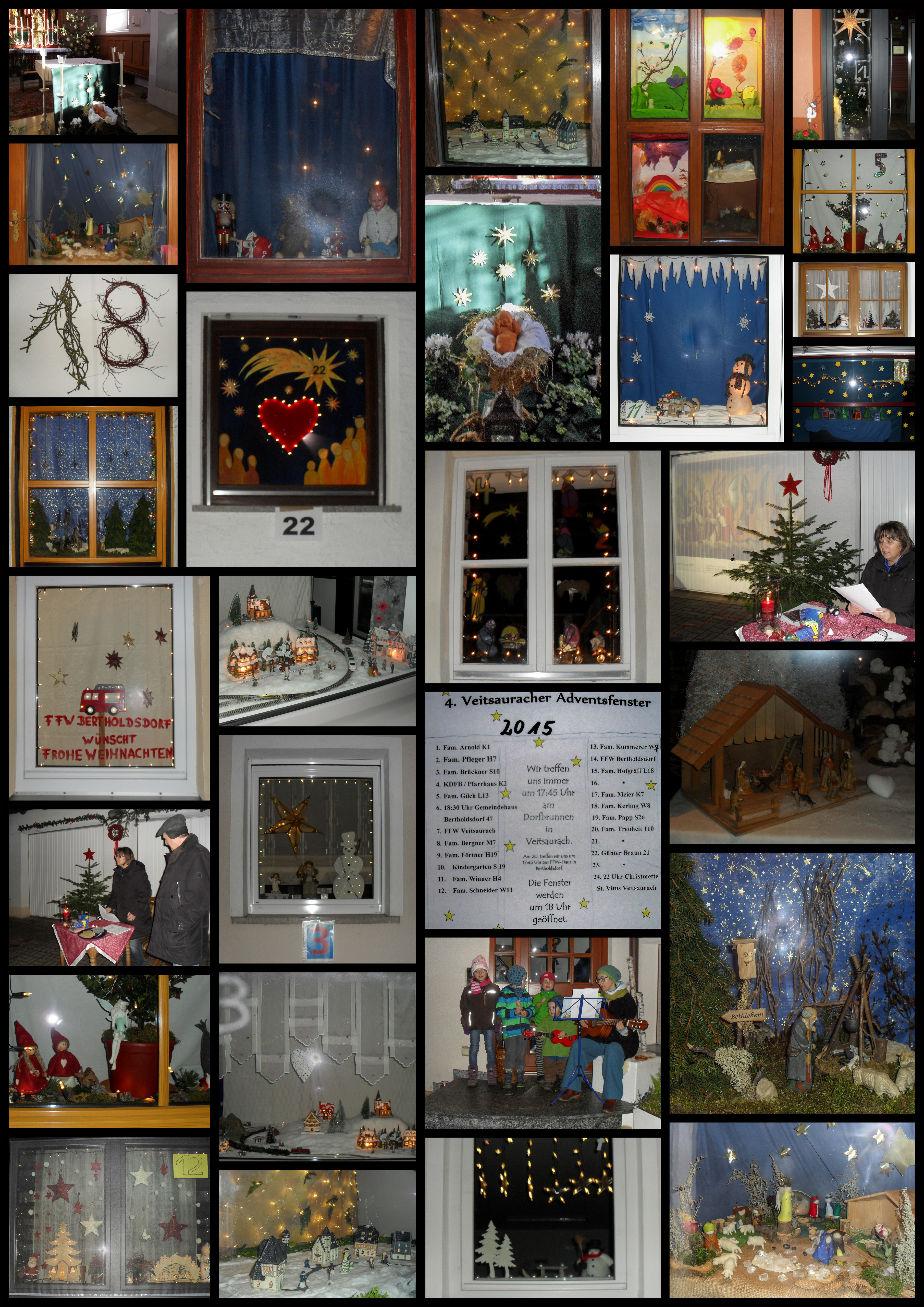 4. Veitsauracher Adventsfenster 2015